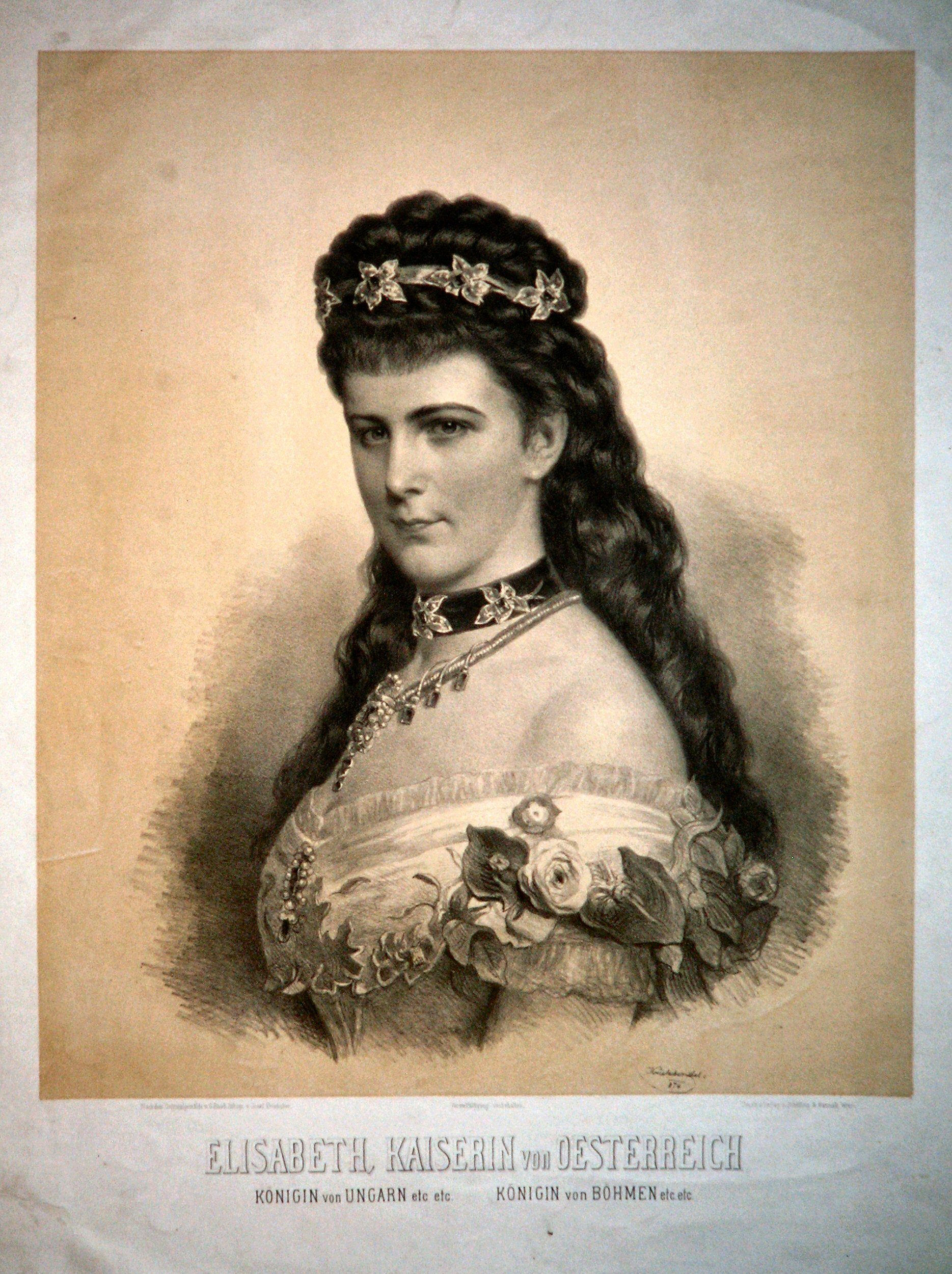 Kaiserin Elisabeth von Österreich (1837-1898), Lithographie von Josef Kriehuber, 1874